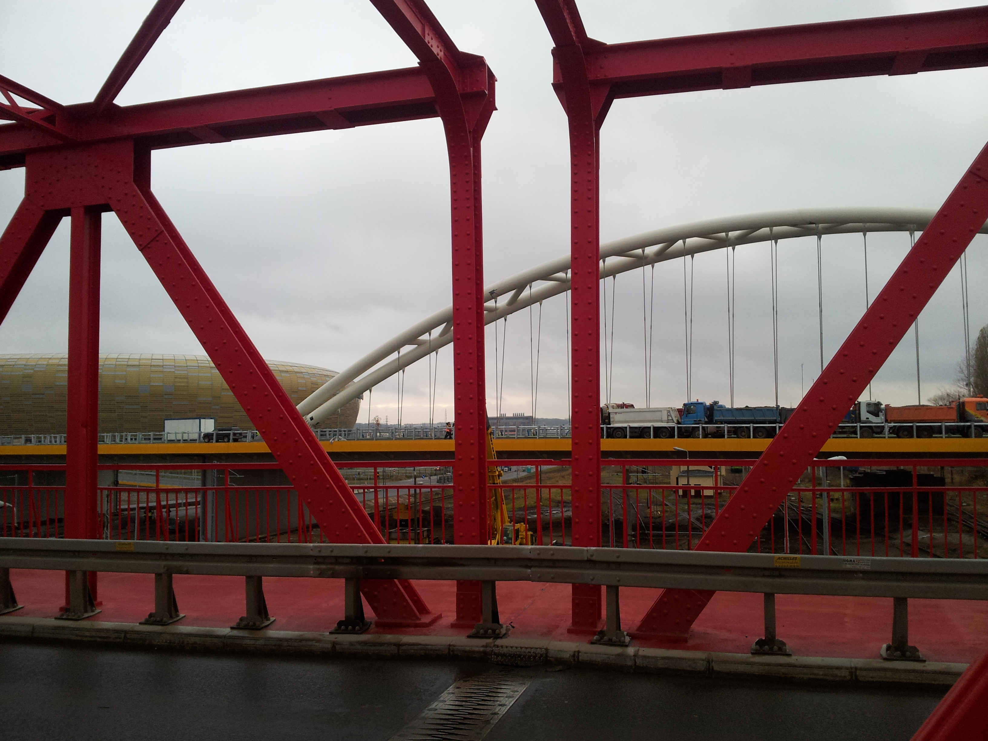 Testy obciążeniowe wiaduktu przy stadionie w Gdańsku.